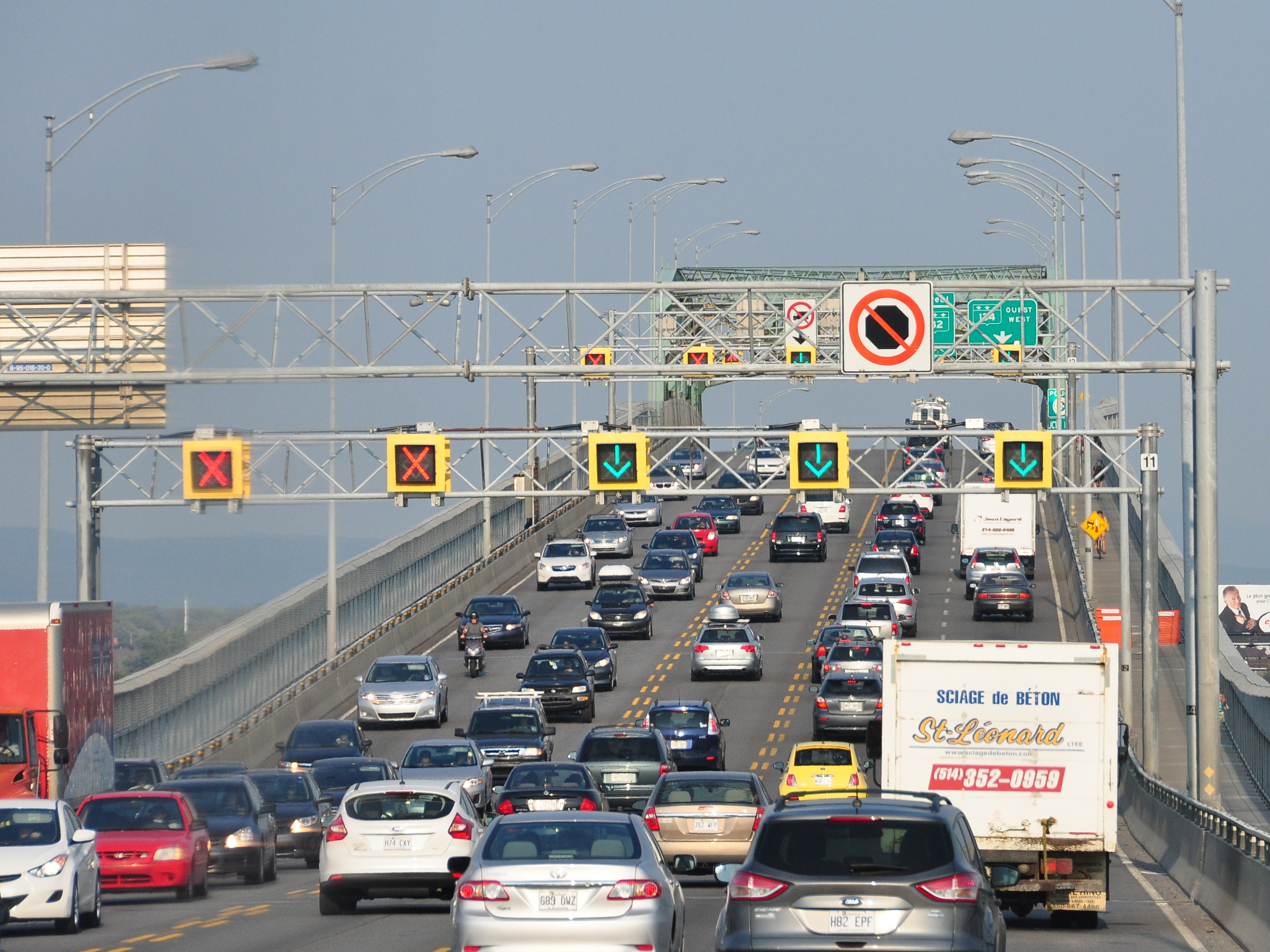 Montréal